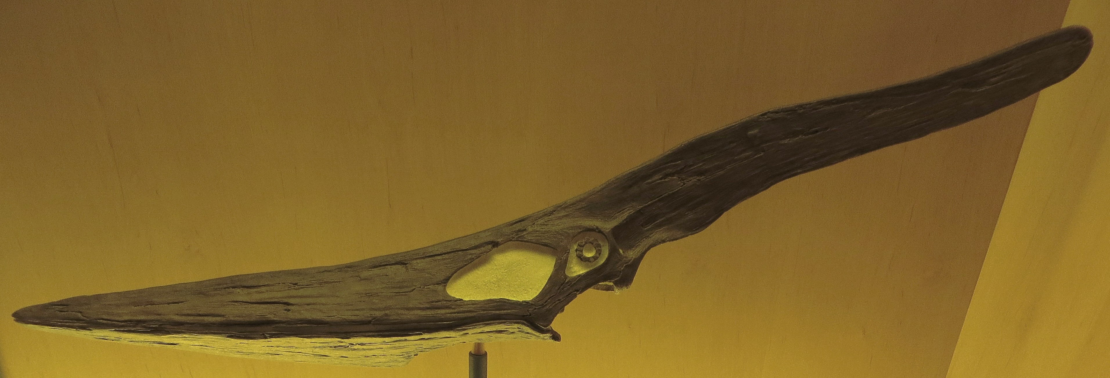 Fossil of Pteranodon, an extinct reptile- Took the picture at Museo de la Naturaleza y el Hombre - Tenerife